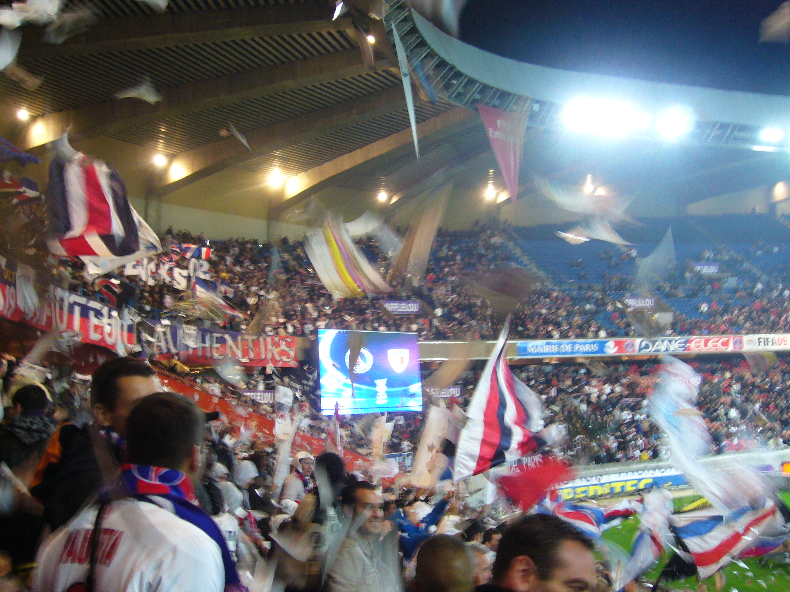 Tifo « papelitos » à Auteuil lors de PSG 0-0 Kayserispor Paris SG 0-0 Kayserispor, Parc des Princes, 2 October 2008, Paris.